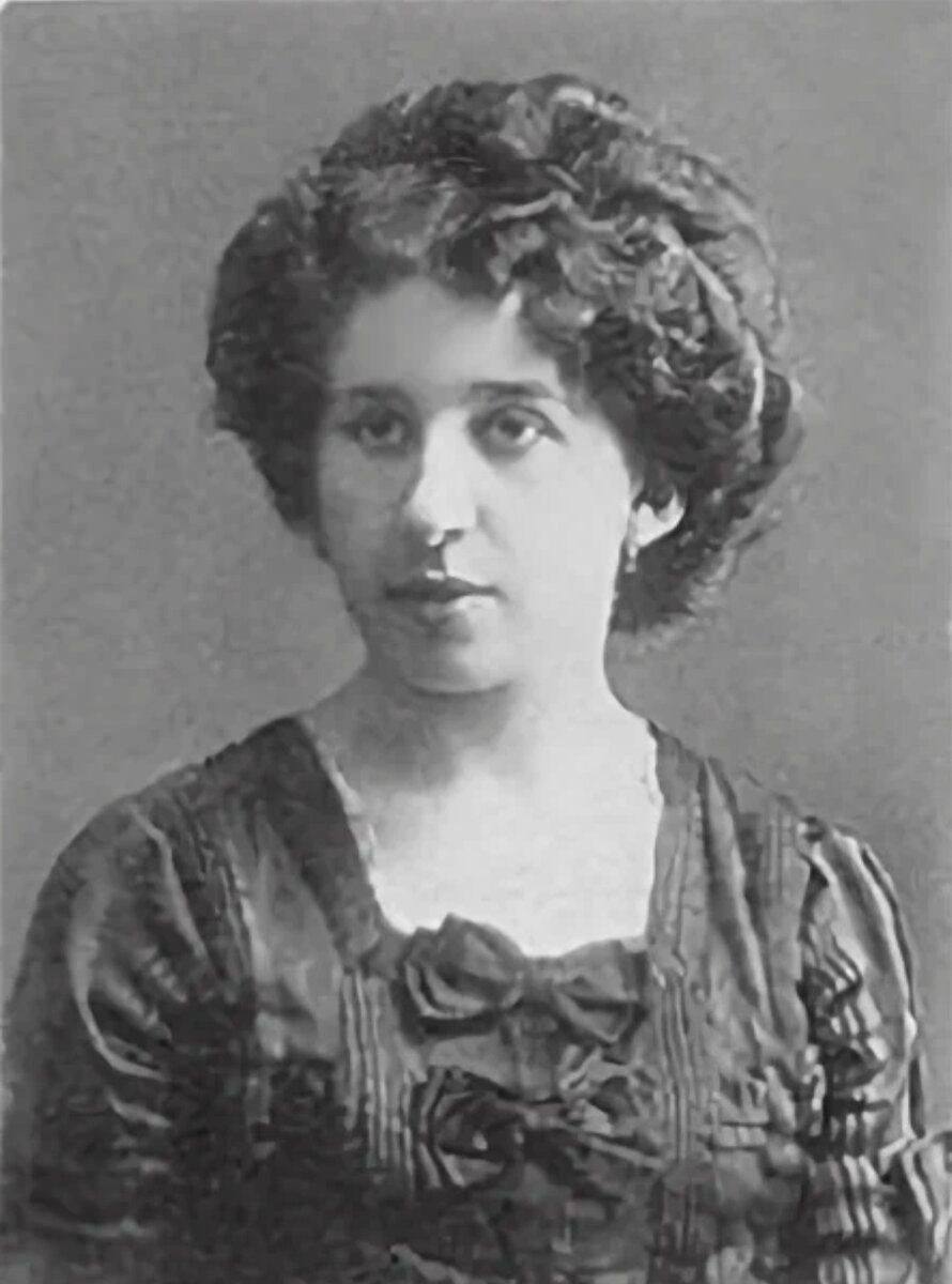 Lidiya Zvereva aviator diploma